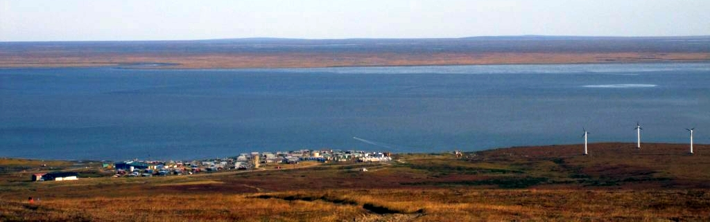 Toksook Bay